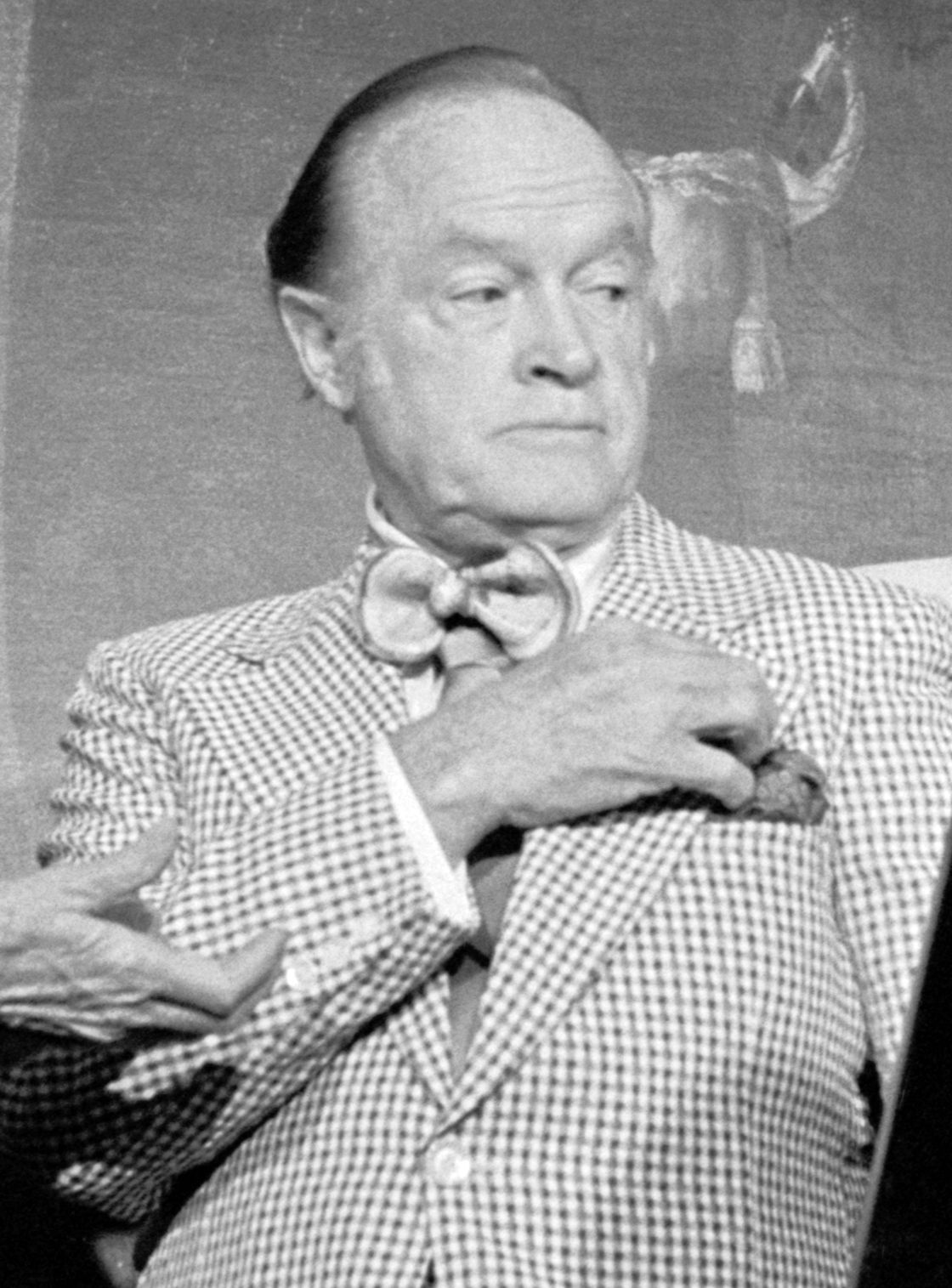 Bob Hope gets plaque on Hill.